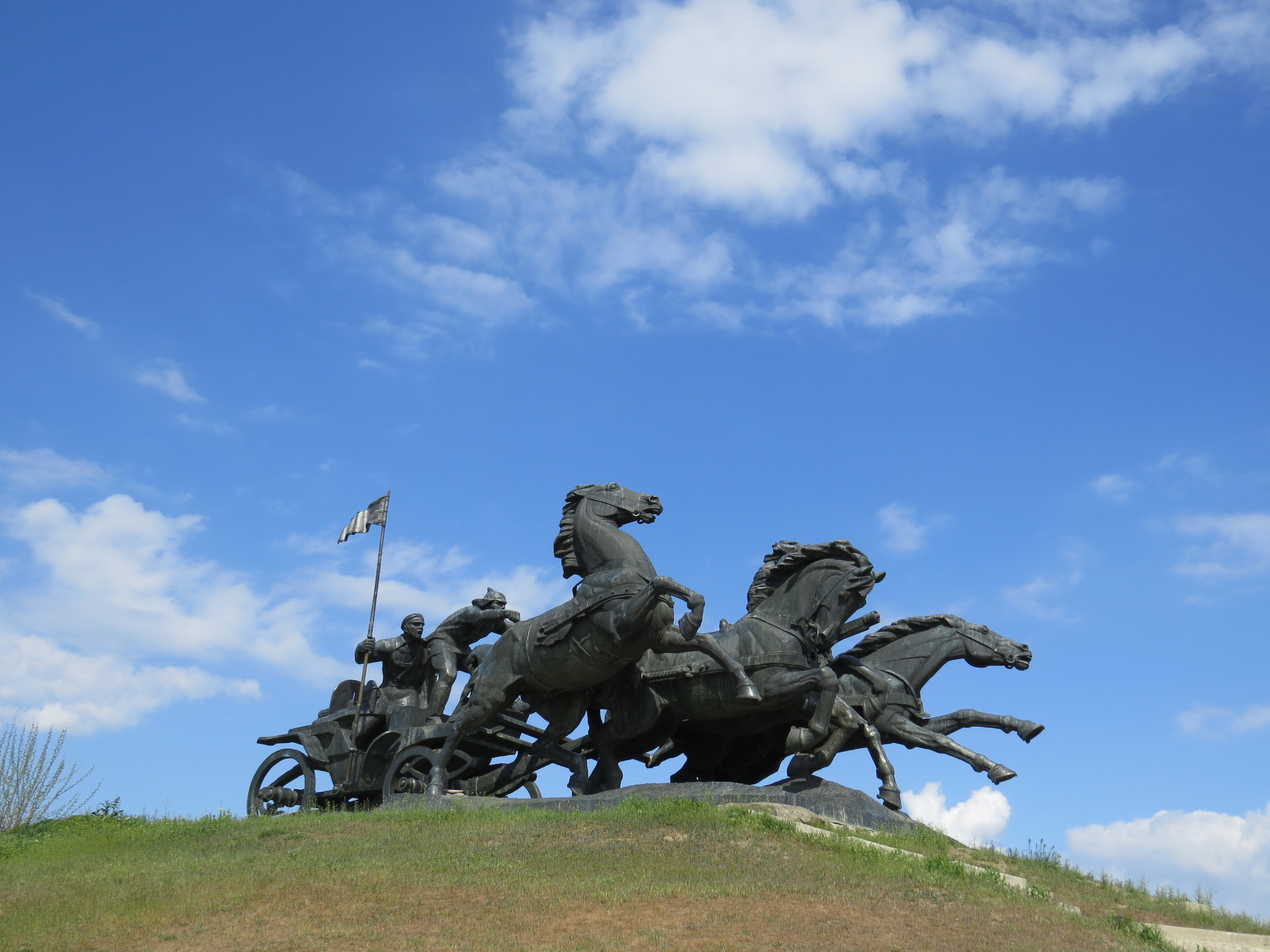 Монумент “Легендарна тачанка”, Каховка